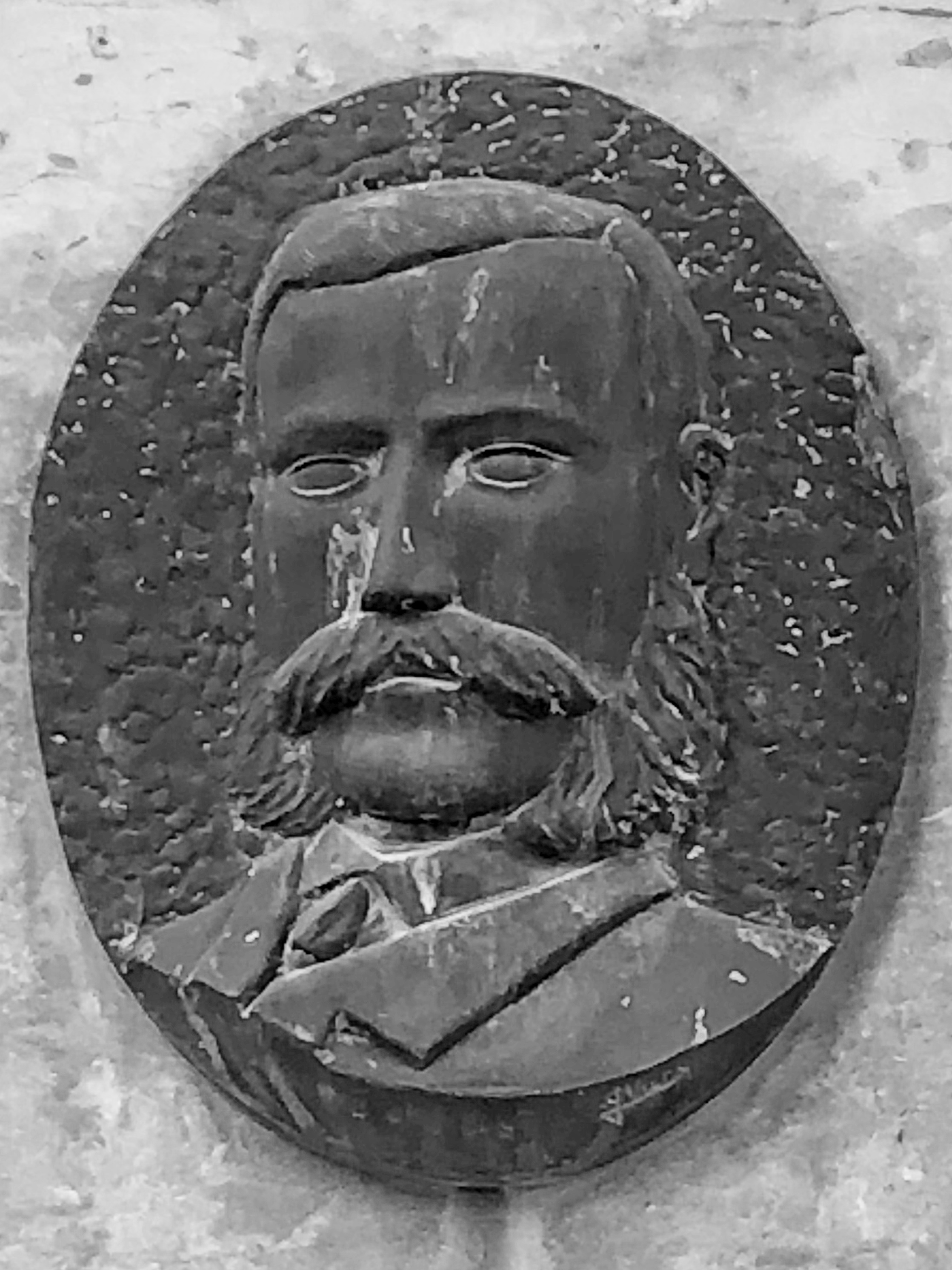 Monumento al espía y explorador Joaquín Gatell en su pueblo natal de Altafulla (Tarragona, España). Detalle del retrato.